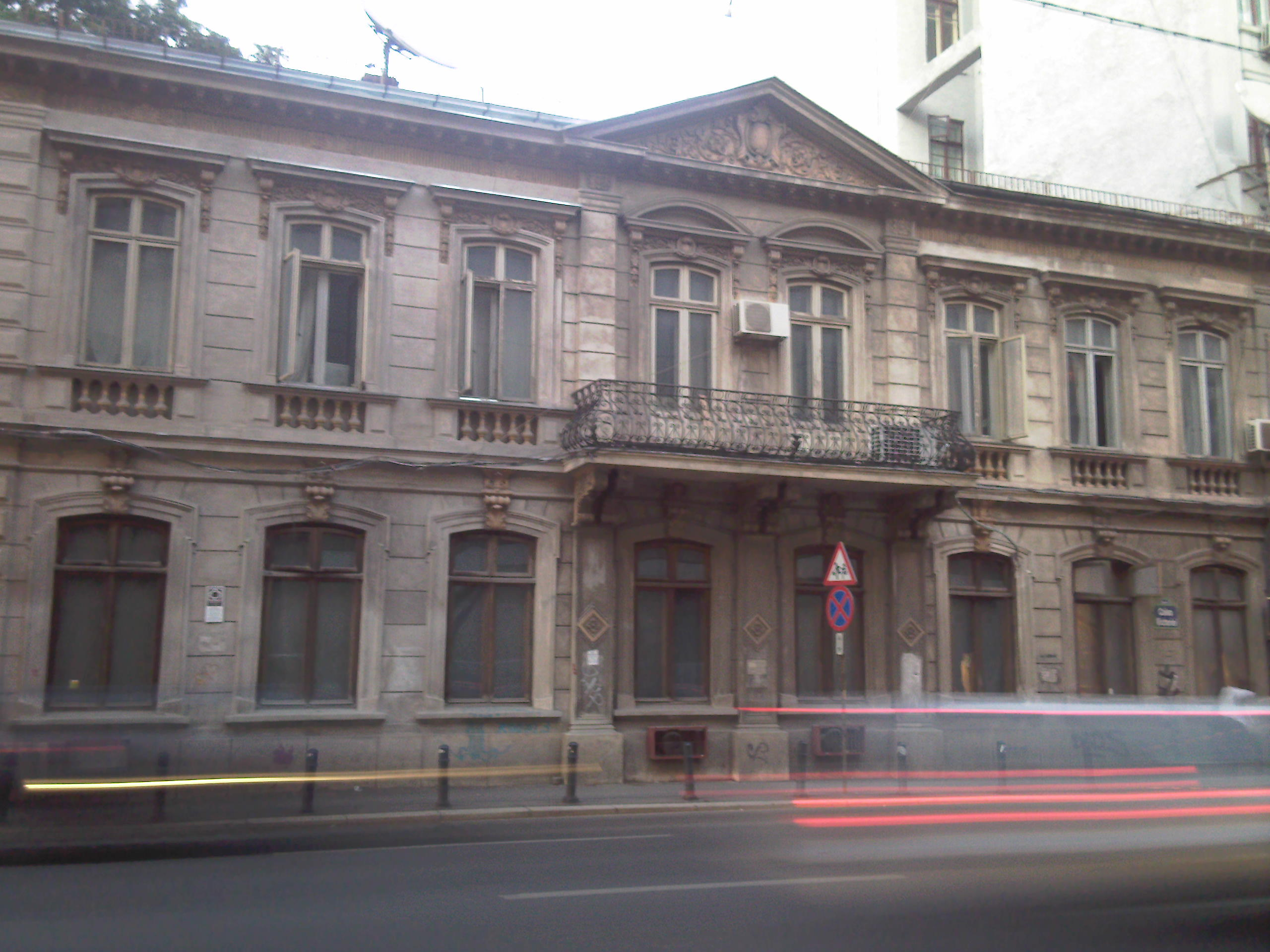 Casa Algiu - Toma Stelian